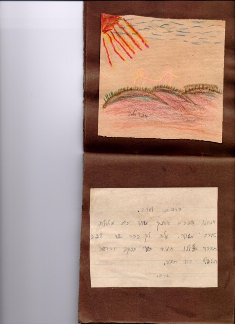 מכתב למטפלת עדה יגורי במלאת לה 32 שנה